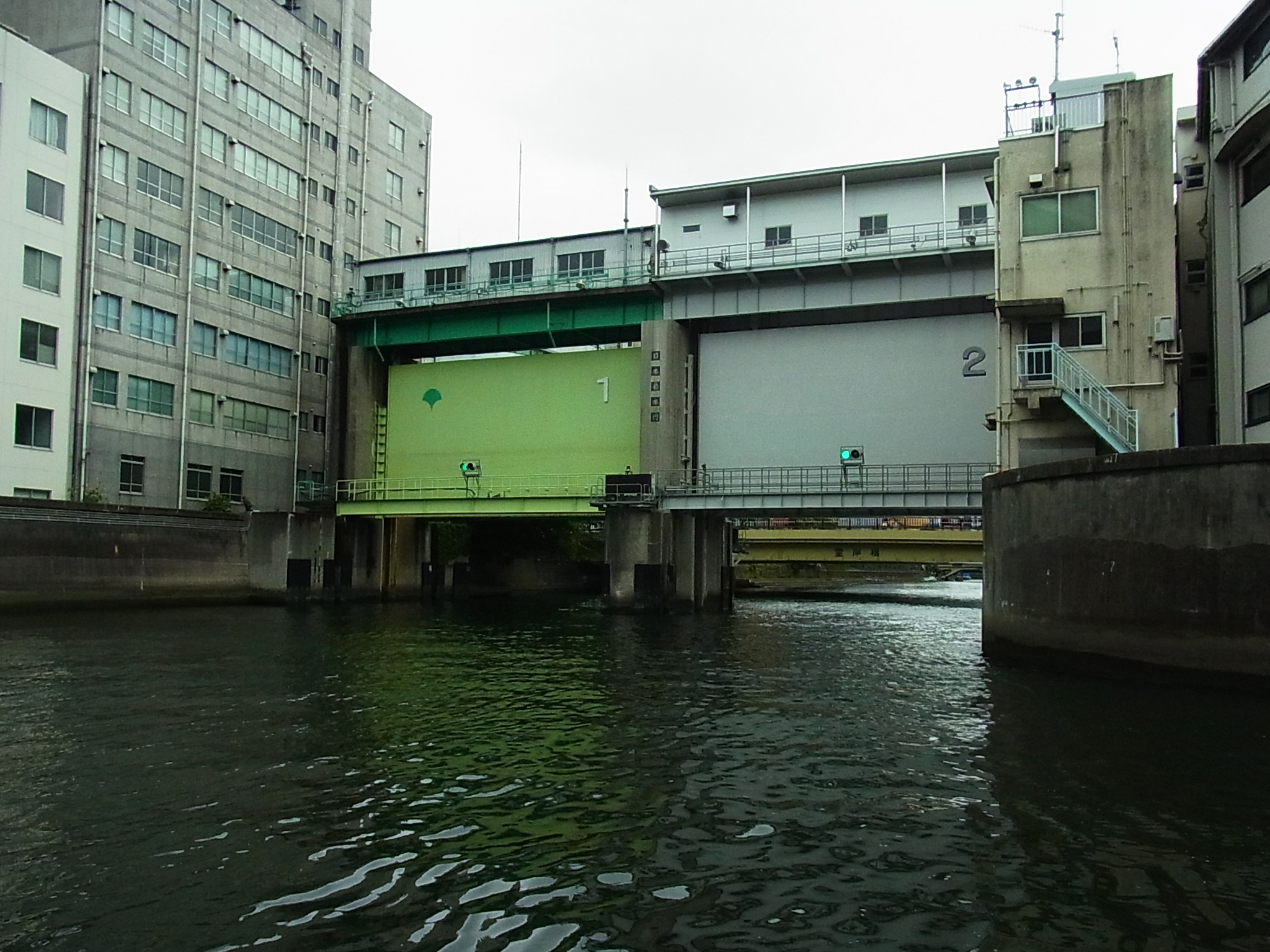 日本橋川の日本橋水門